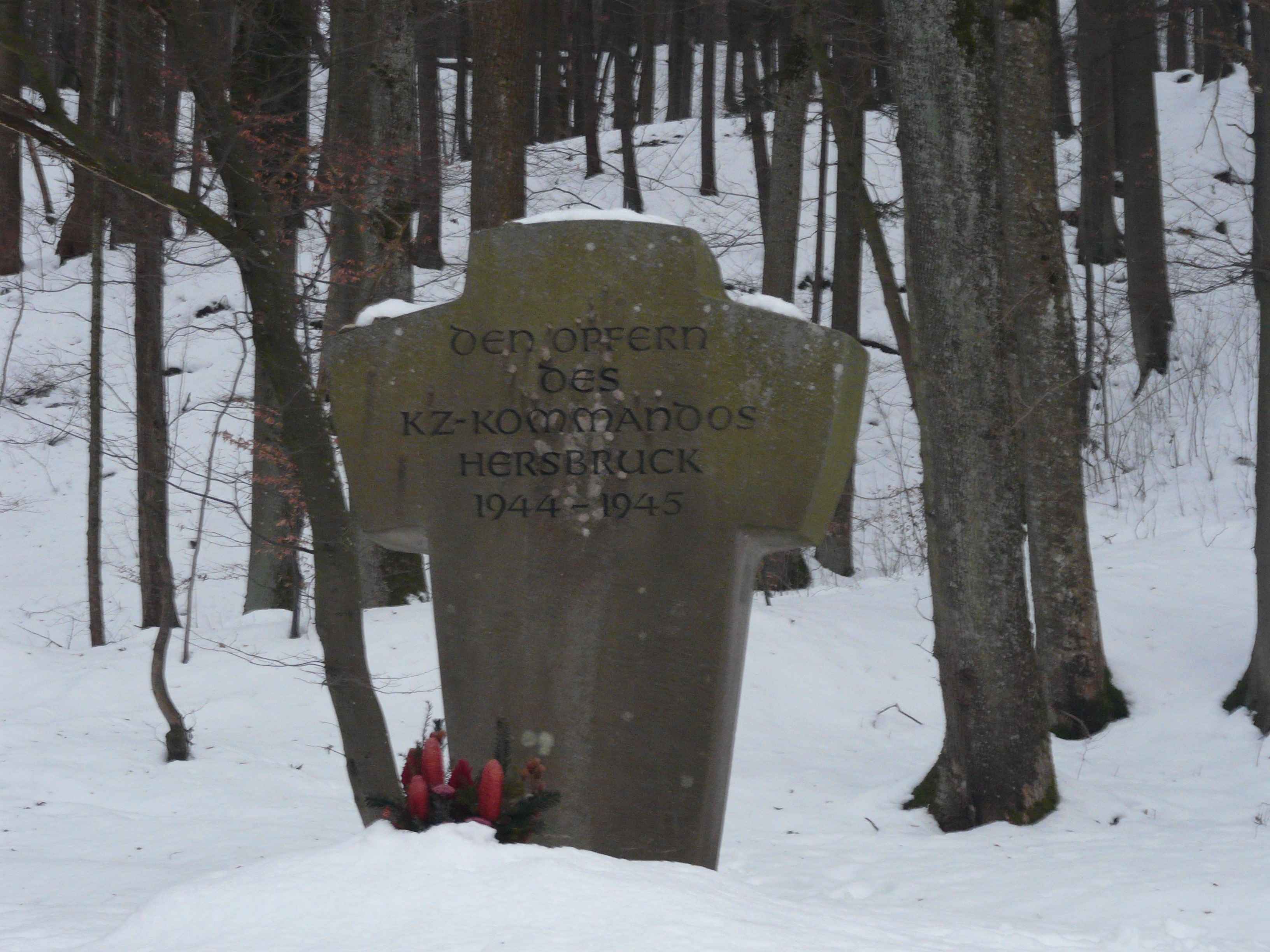 Nahe dem Ort Förrenbach gelegenes Mahnmal der Opfer des KZ-Außenlagers Hersbruck.